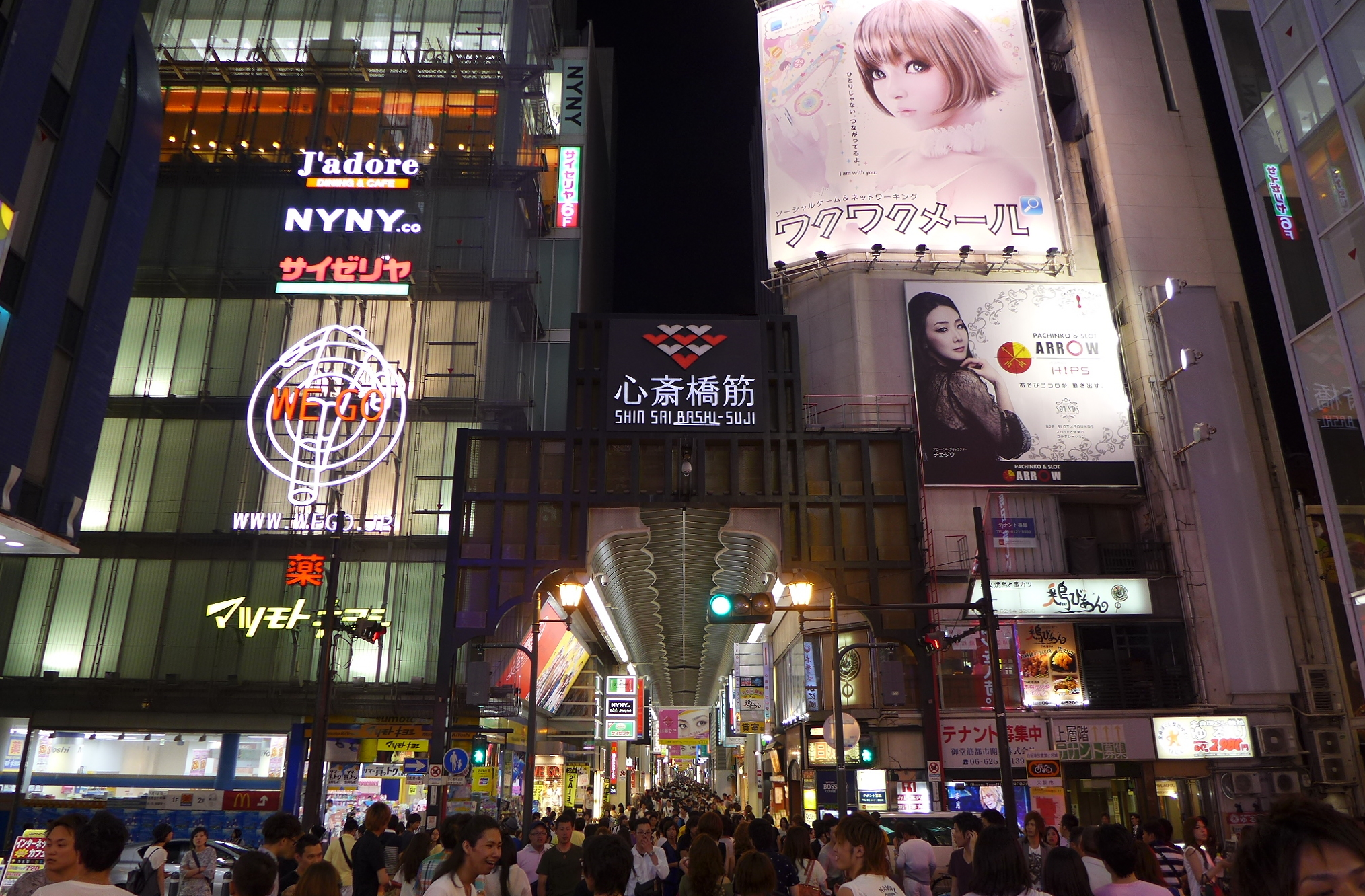 Shinsaibashisuji Gate Night View 心齋橋